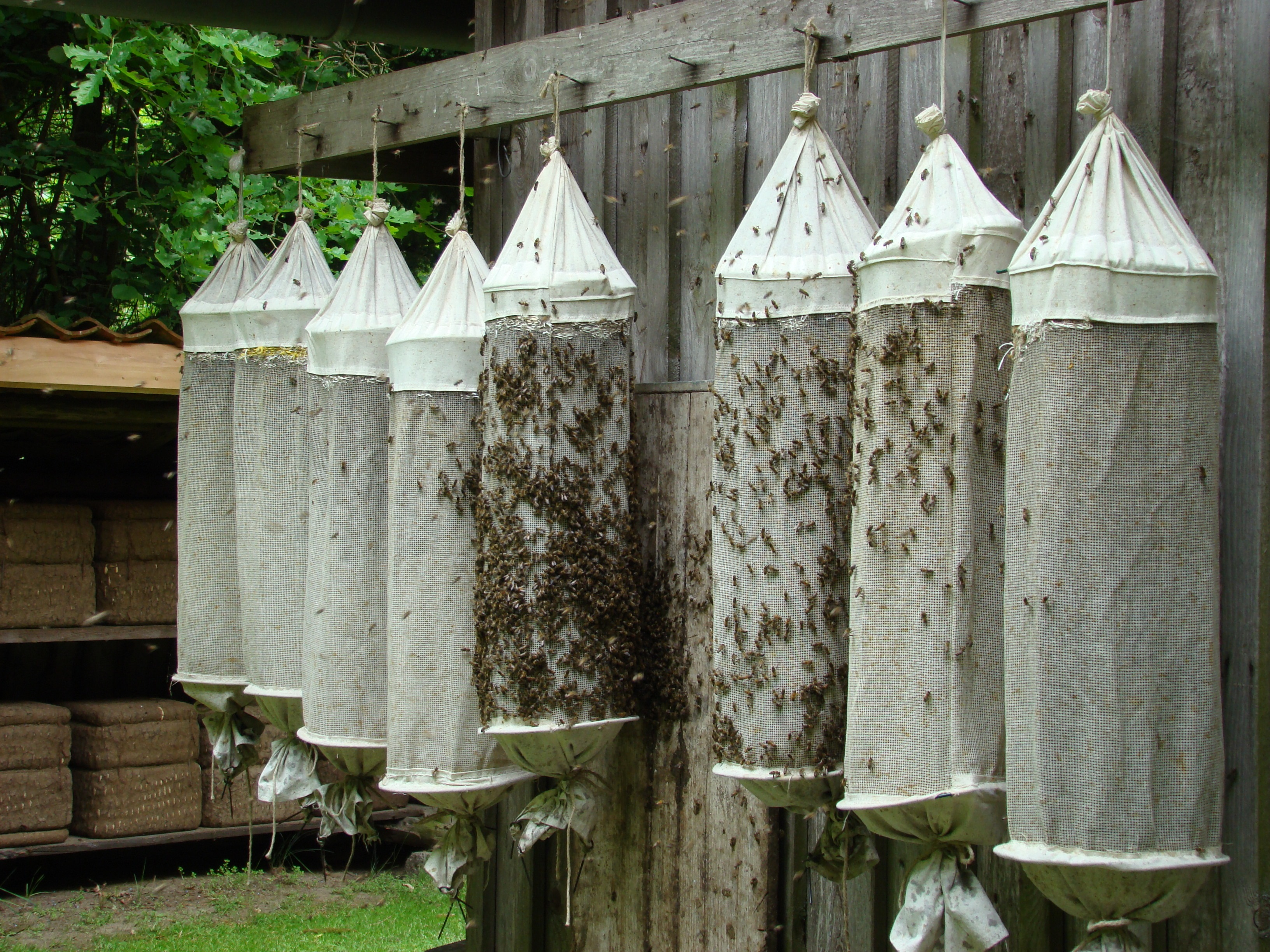 Schwarmsäcke mit einem eingefangenem Bienenschwarm